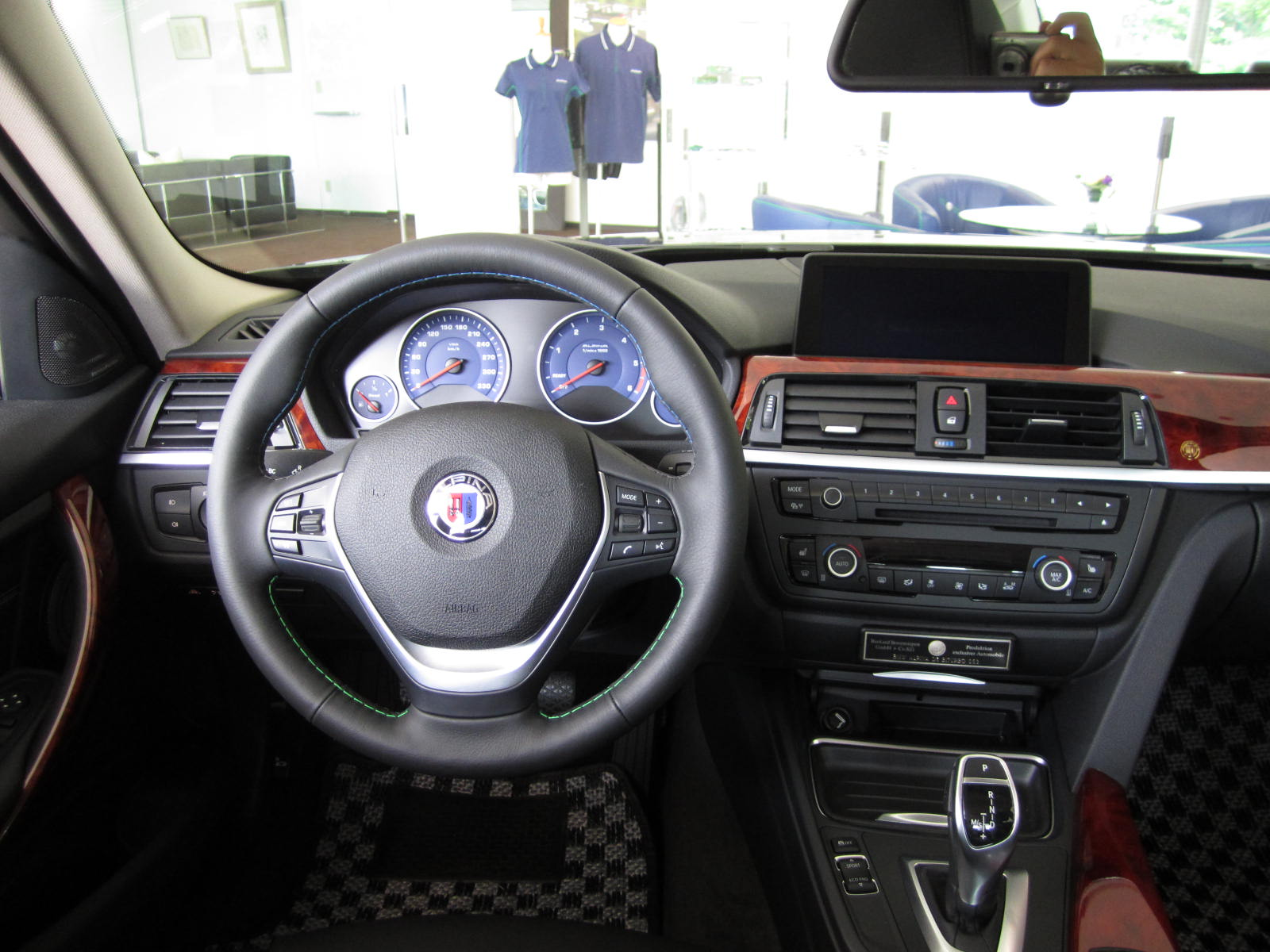 alpina D3 interi